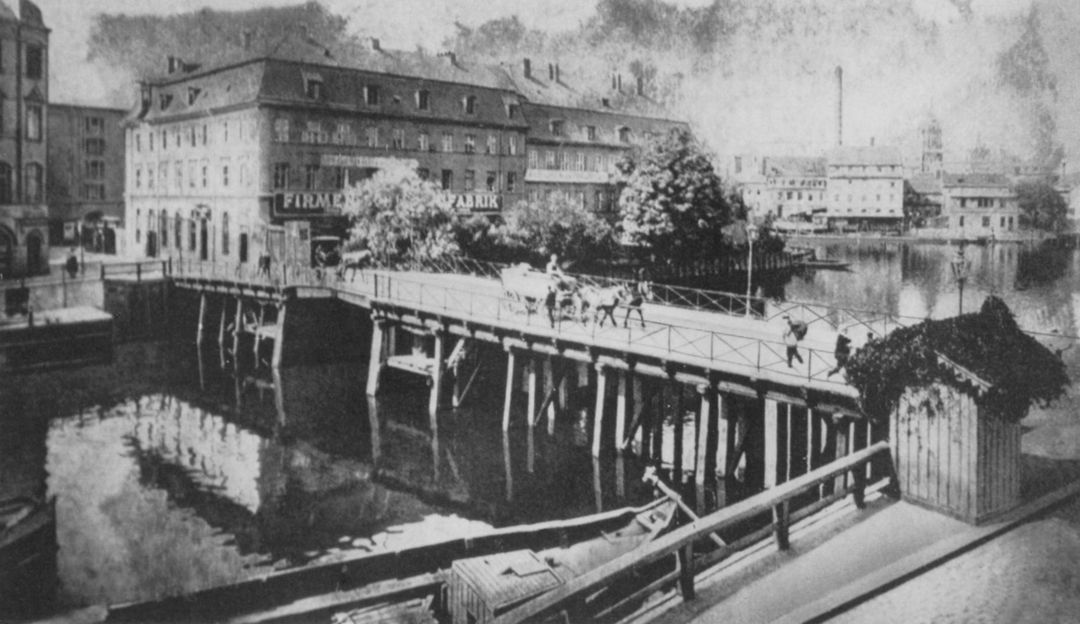 Inselbrücke über den Spreekanal in Berlin